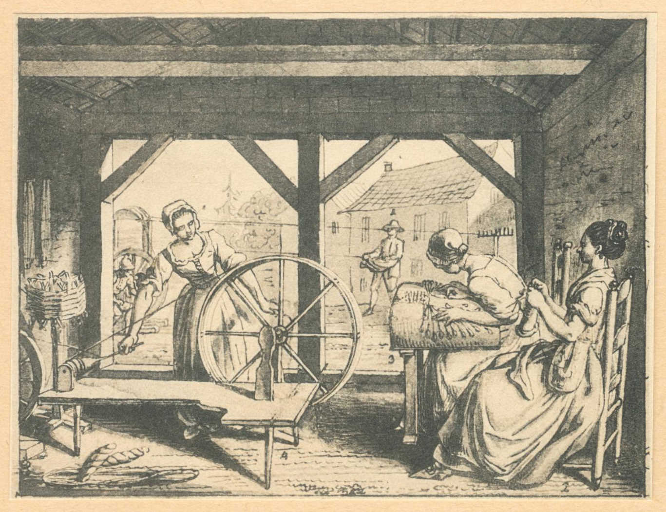 Tab. LVII b. Fleißige Mädchen. (Beschreibung lt. Quelle)